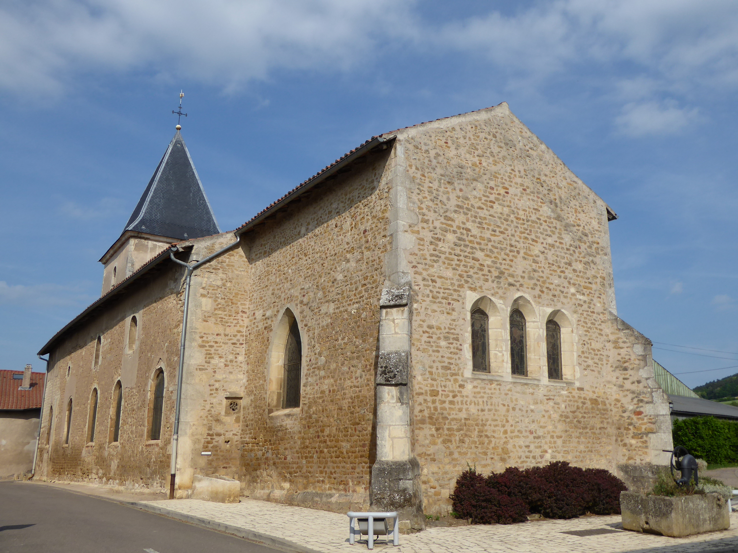 Chevet de l'église Saint-Laurent de Laître-sous-Amance (Meurthe-et-Moselle). .